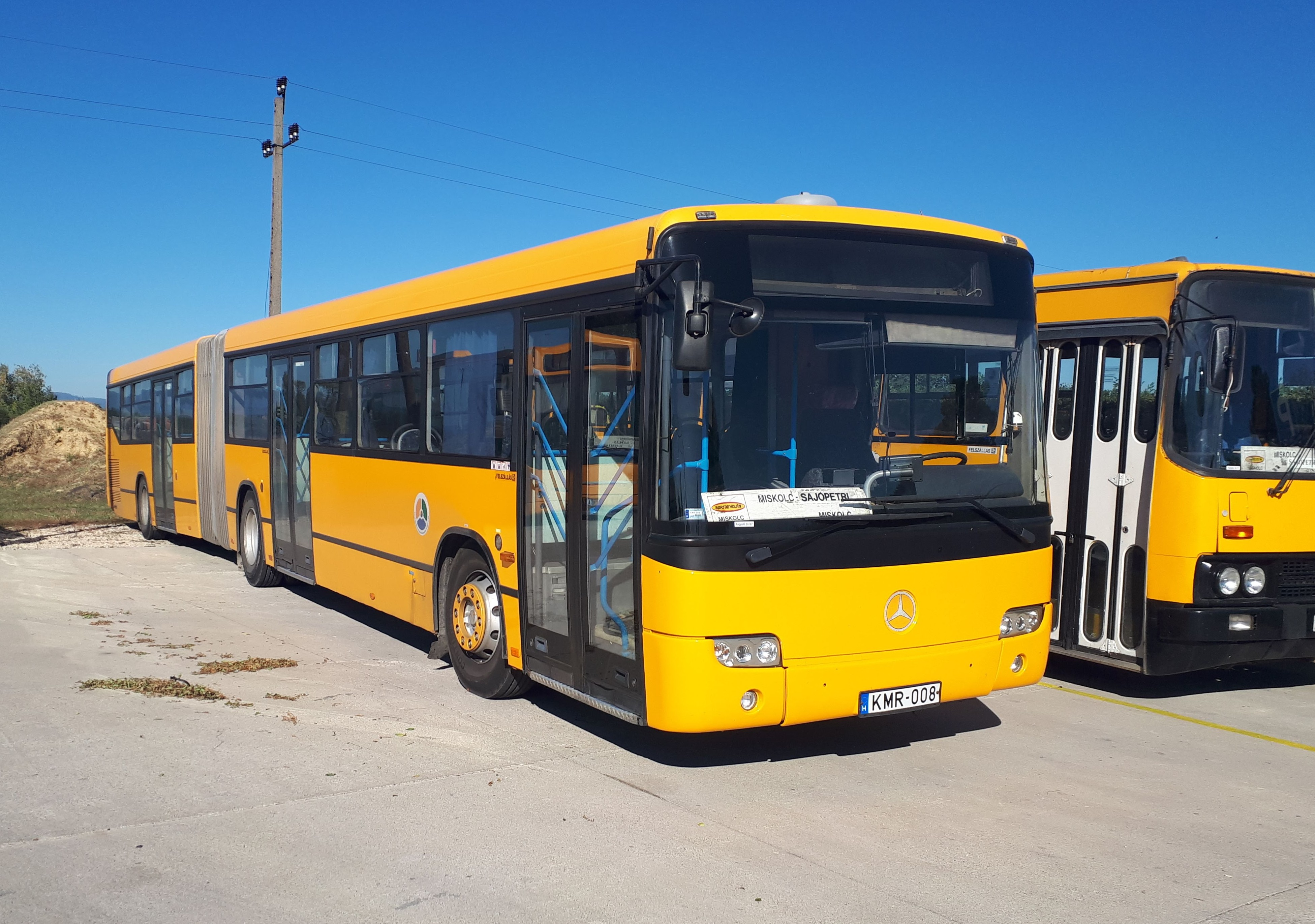 Az ÉMKK KMR-008 rendszámú Mercedes Conecto busza Sajóládon, a 3735-ös helyközi járaton.